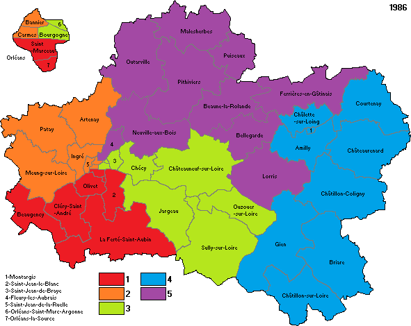 Circonscriptions du Loiret en 1986